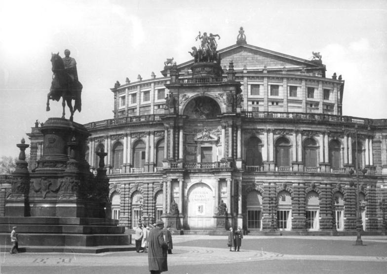 Dresden, Semper-Oper Zentralbild Wegewitz Wz 14.6.60 Blick auf das Gebäude der Dresdner Oper